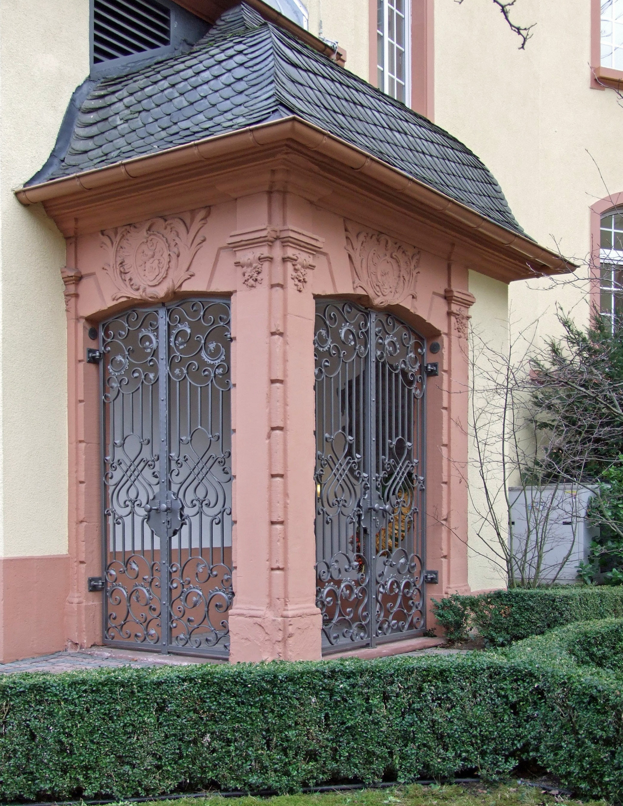 Grab von Johann Christian Senckenberg am Buergerhospital in Ffm